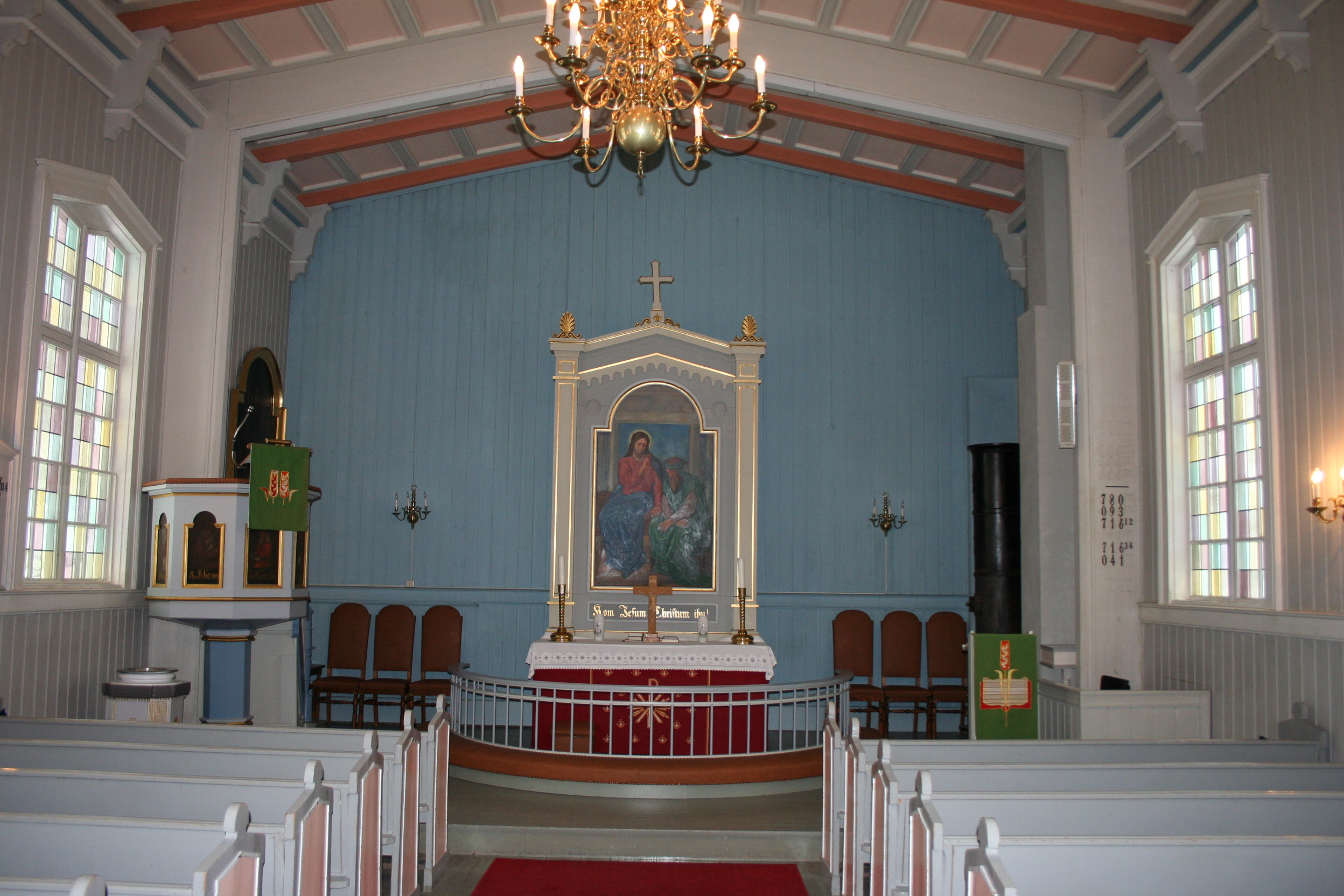 Alterparti, Konnerud gamle kirke,Drammen